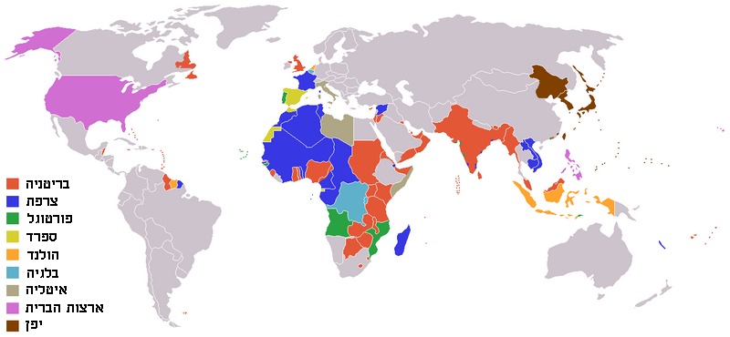 קולוניות בשנת 1945 (תרגום לעברית של Colonization 1945.png) רישיון קטגוריה:תמונות להעברה לוויקישיתוף